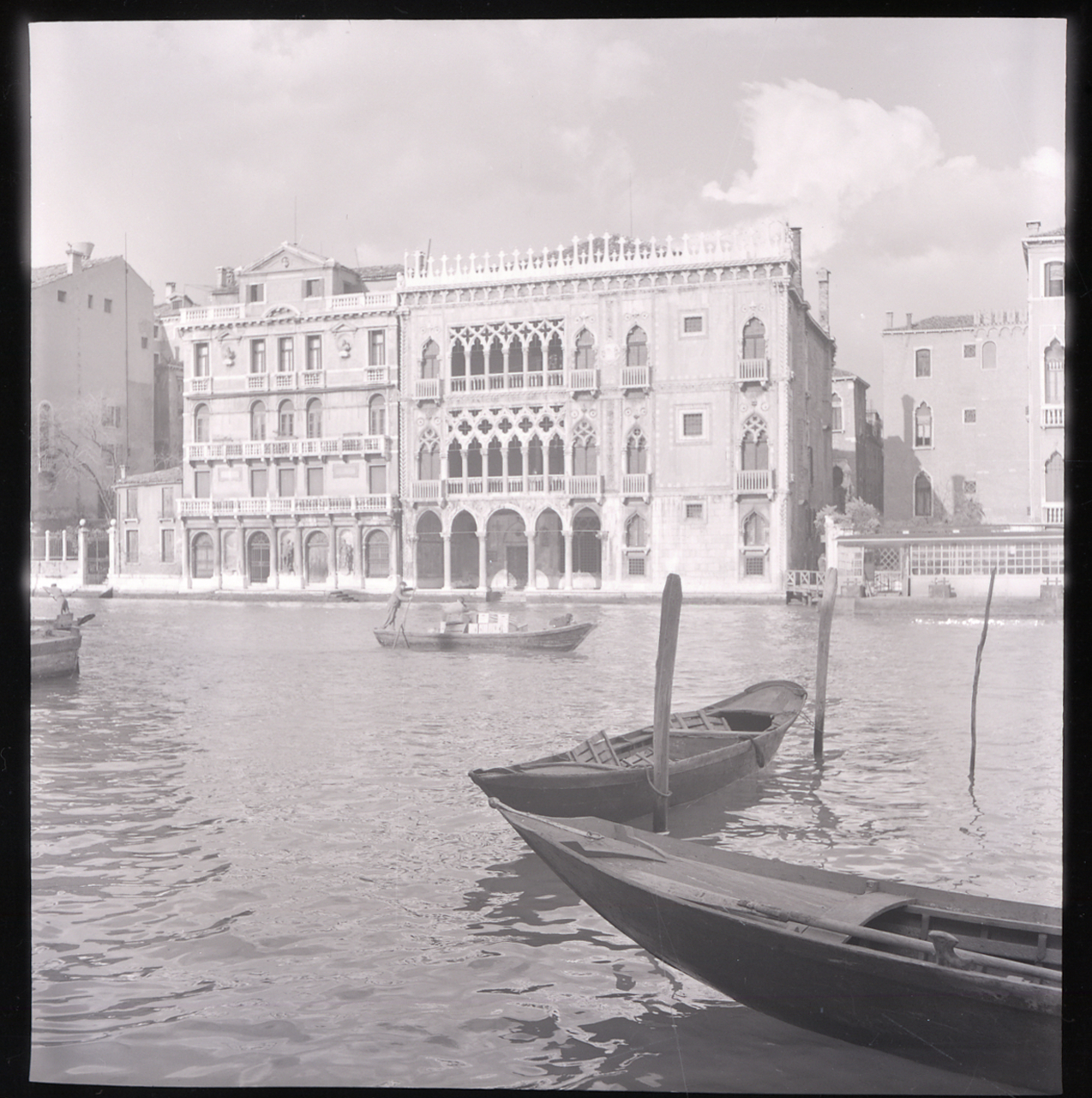 Servizio fotografico : Venezia, 1970 / Paolo Monti. - Buste: 2, Fototipi: 2 : Negativo b/n, gelatina bromuro d'argento/ pellicola ; 6x6. - ((Serie costituita da 2 buste di negativi identificati con i nn.: 5569, 5570, e tenute insieme da una graffetta. - Sulla busta identificata con il n. 5569 iscrizione didascalica manoscritta a pennarello.